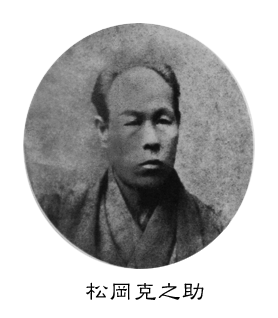 Photograph of Samurai Katsunosuke Matsuoka